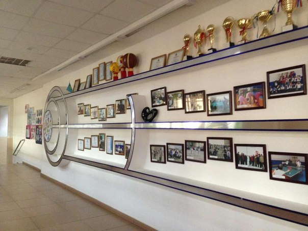 Оқушылардың спорт жетістіктердің стенді